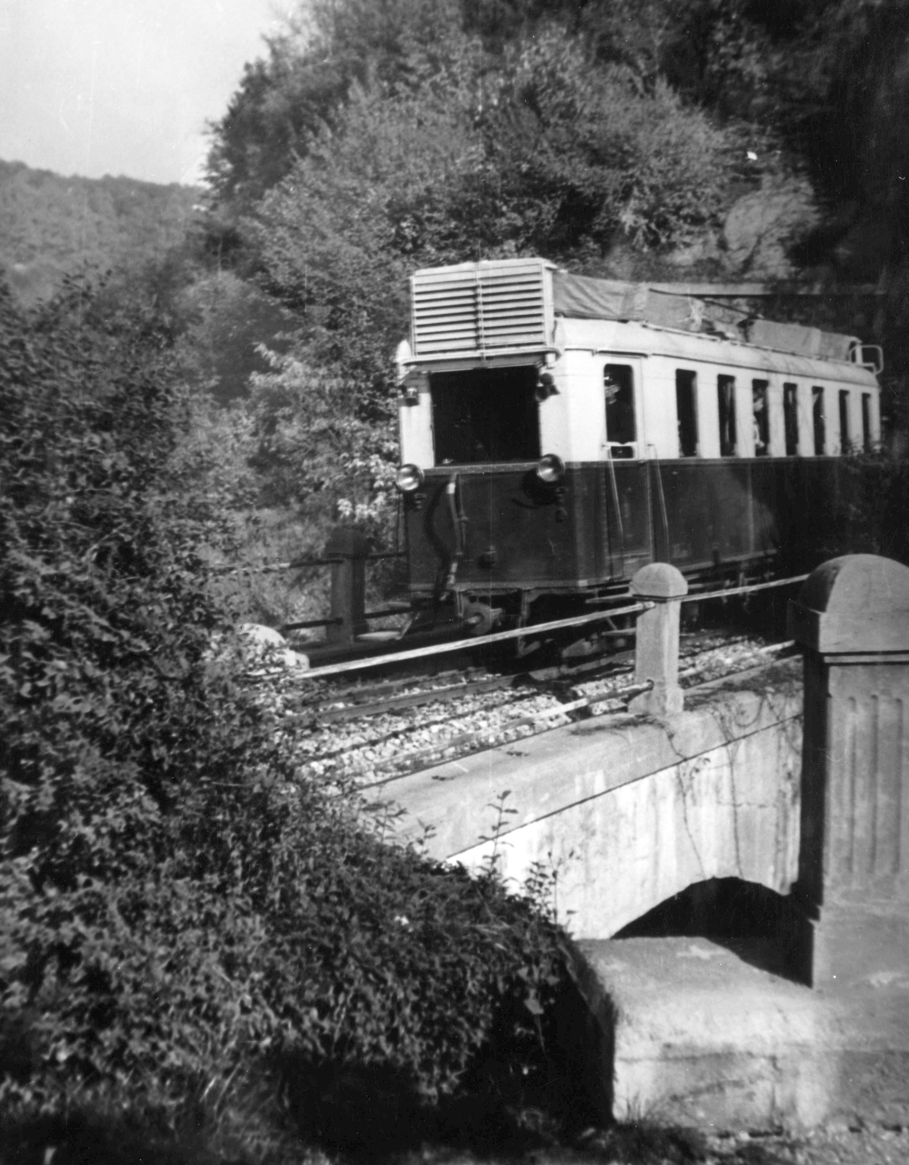 a Lillafüredi Állami Erdei Vasút 1928-ban gyártott Ganz motorkocsija. Location: Hungary, Lillafüred Tags: narrow-gauge railway Title: a Lillafüredi Állami Erdei Vasút 1928-ban gyártott Ganz motorkocsija.